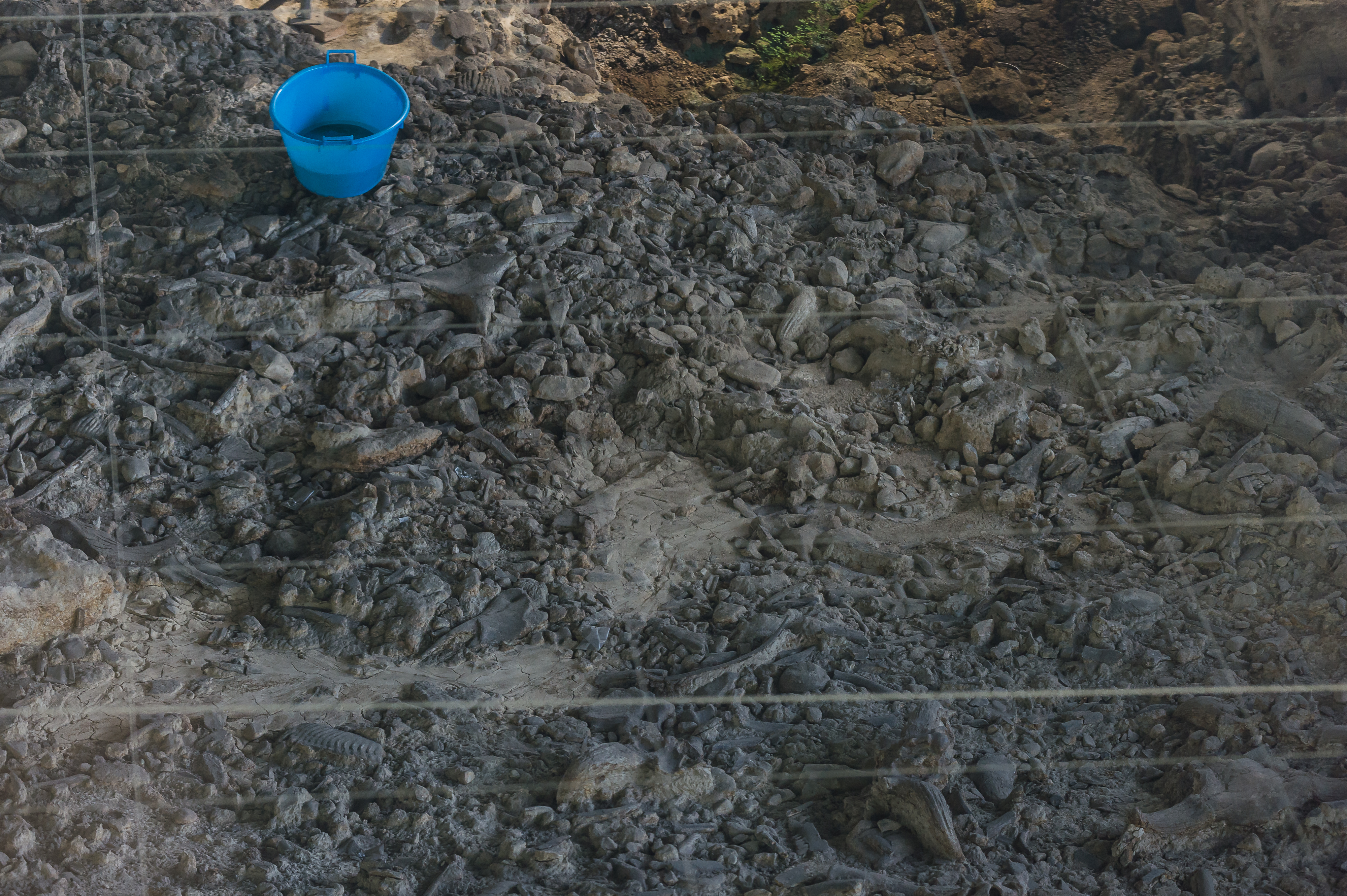 Isernia La Pineta, Sektor I, Begehhorizont 3a.